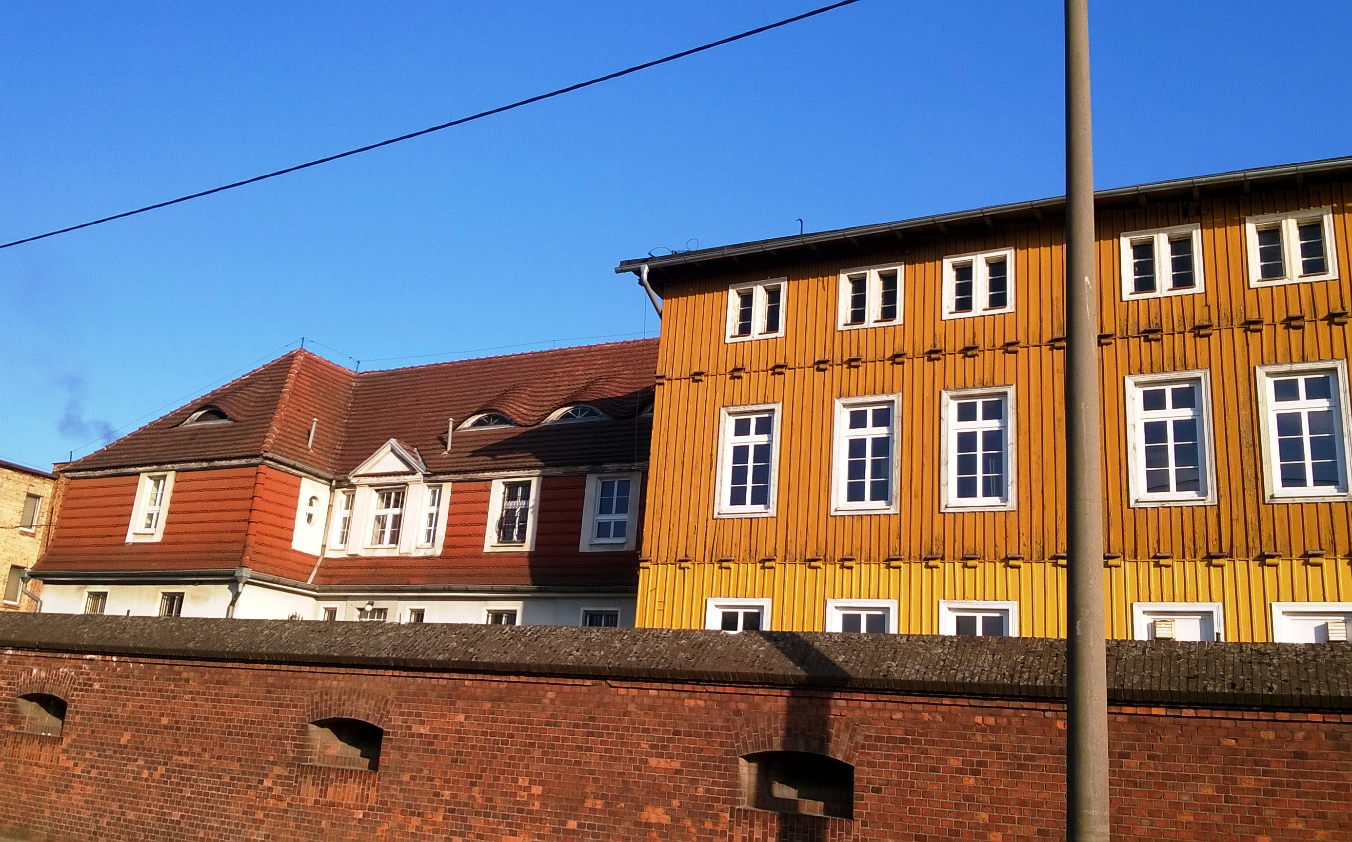 Lacpol Toruń